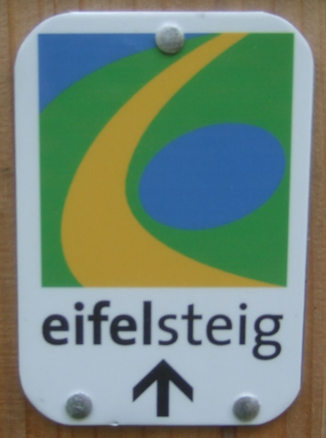 Hinweisschild Eifelsteig